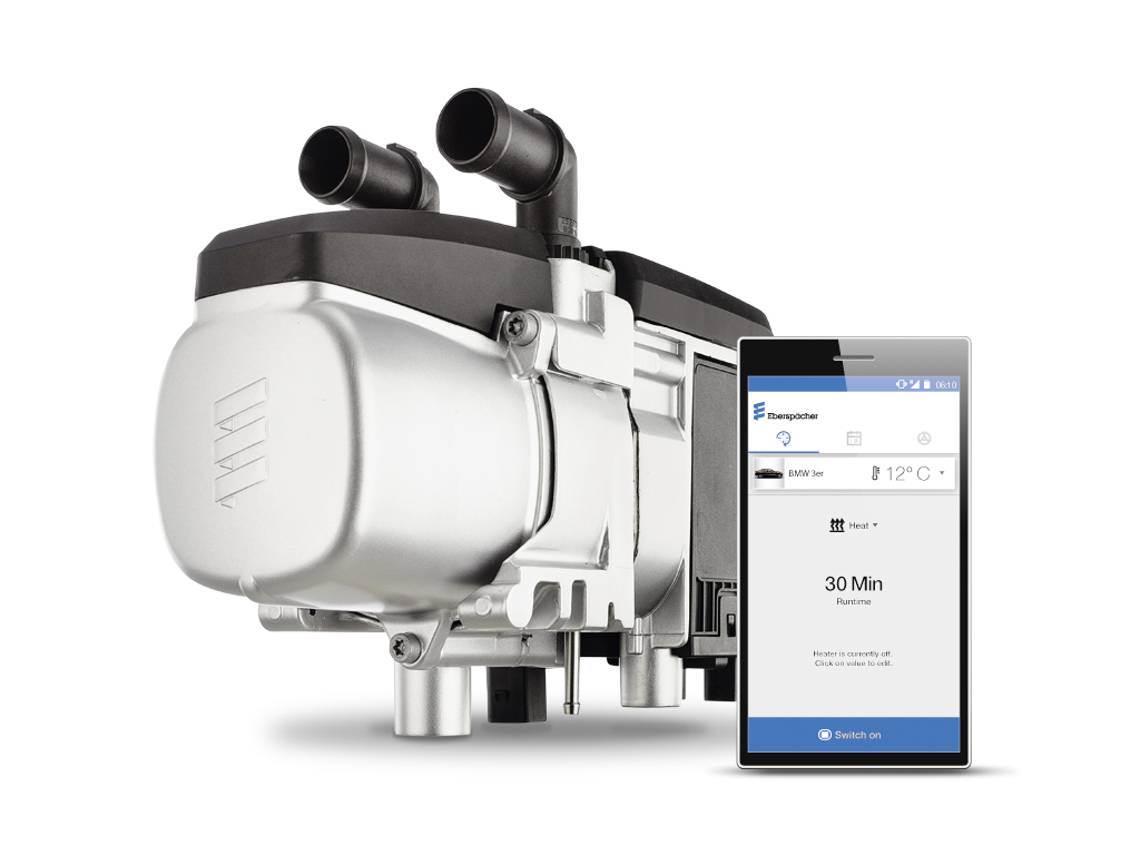 Wasserheizgerät und Bedienelement zur Kommunikation zwischen Smartphone und Standheizung